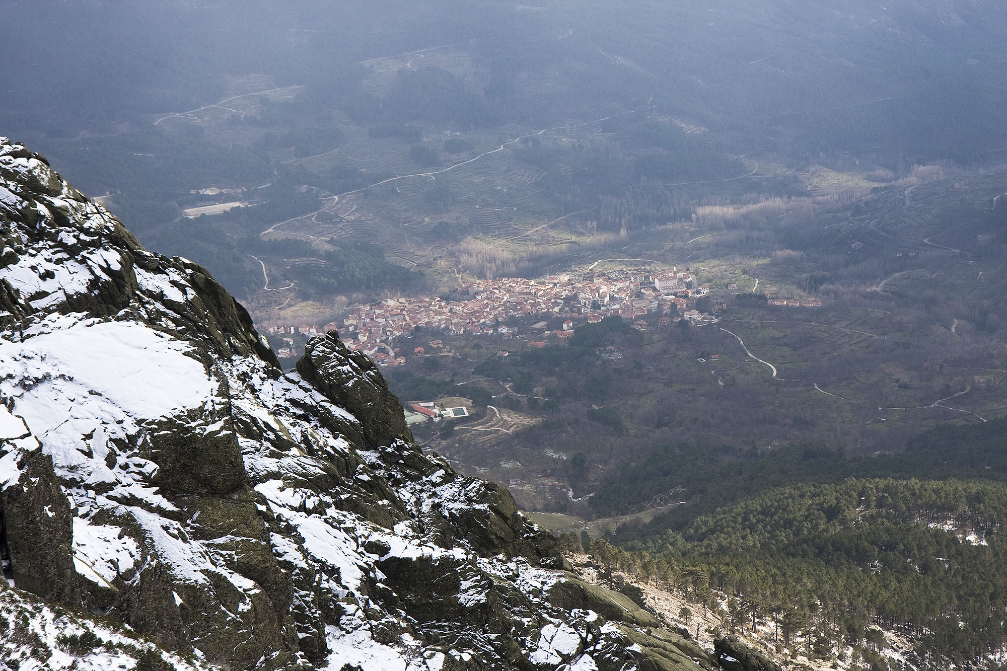 El Arenal desde el puerto de La Cabrilla